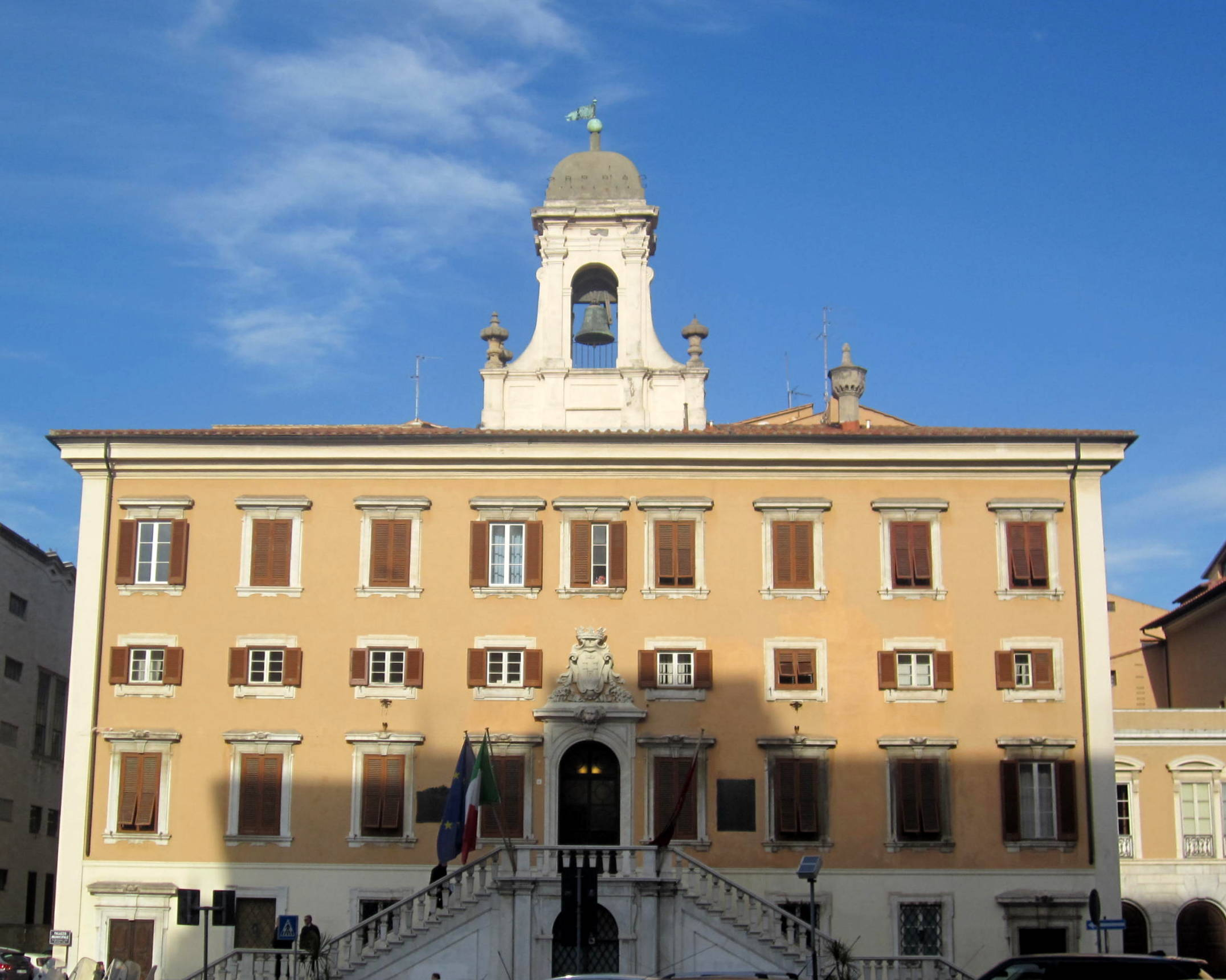 Palazzo Comunale di Livorno